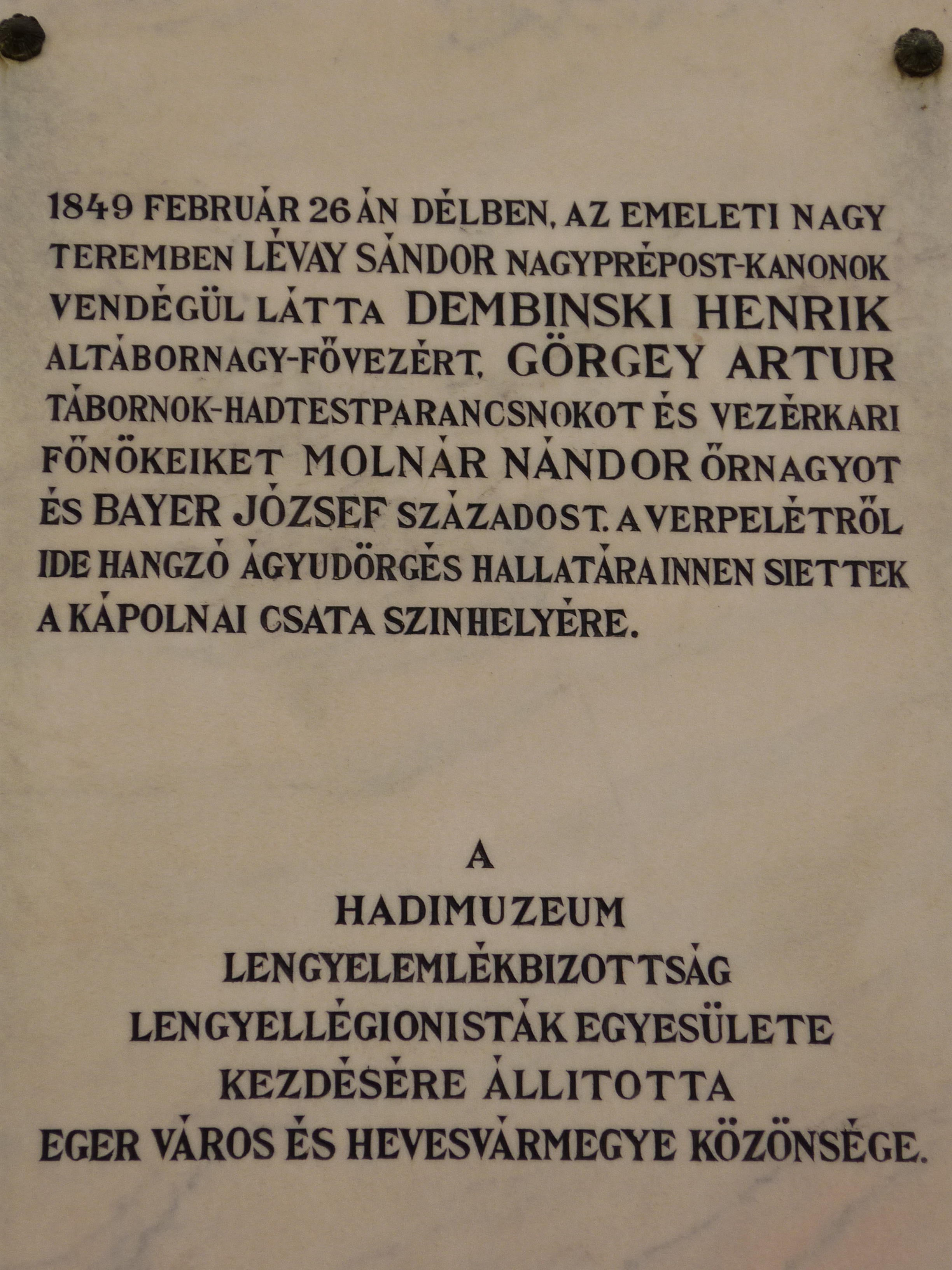 A kápolnai csata előtti tanácskozás emléktáblája Egerben